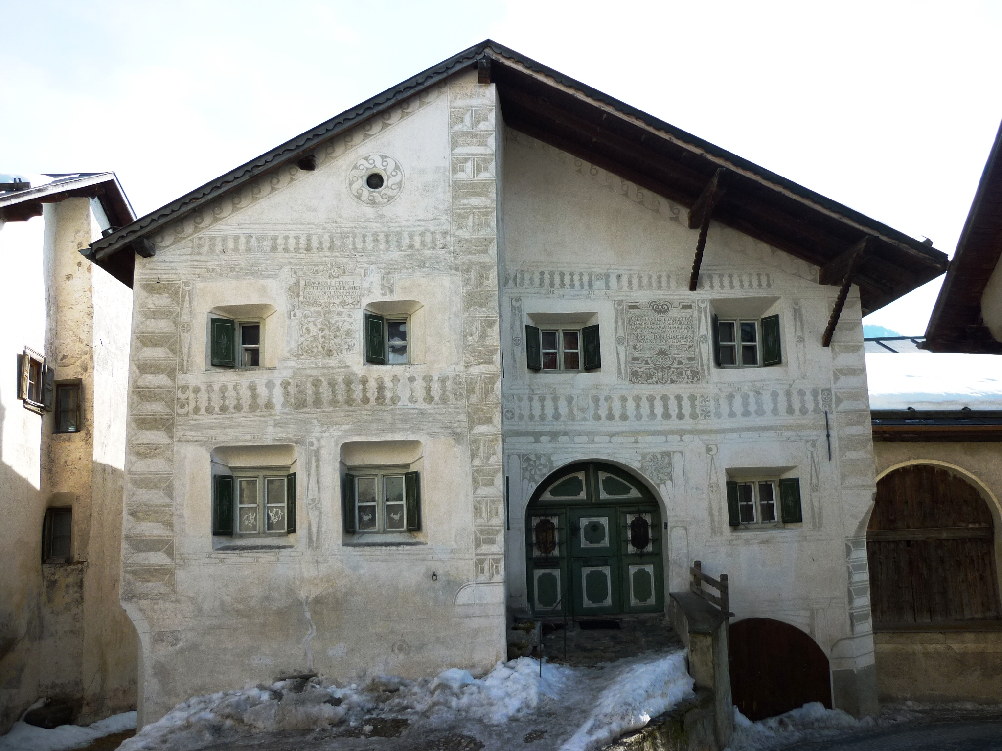 Schellenursli-Haus, Guarda GR, Schweiz